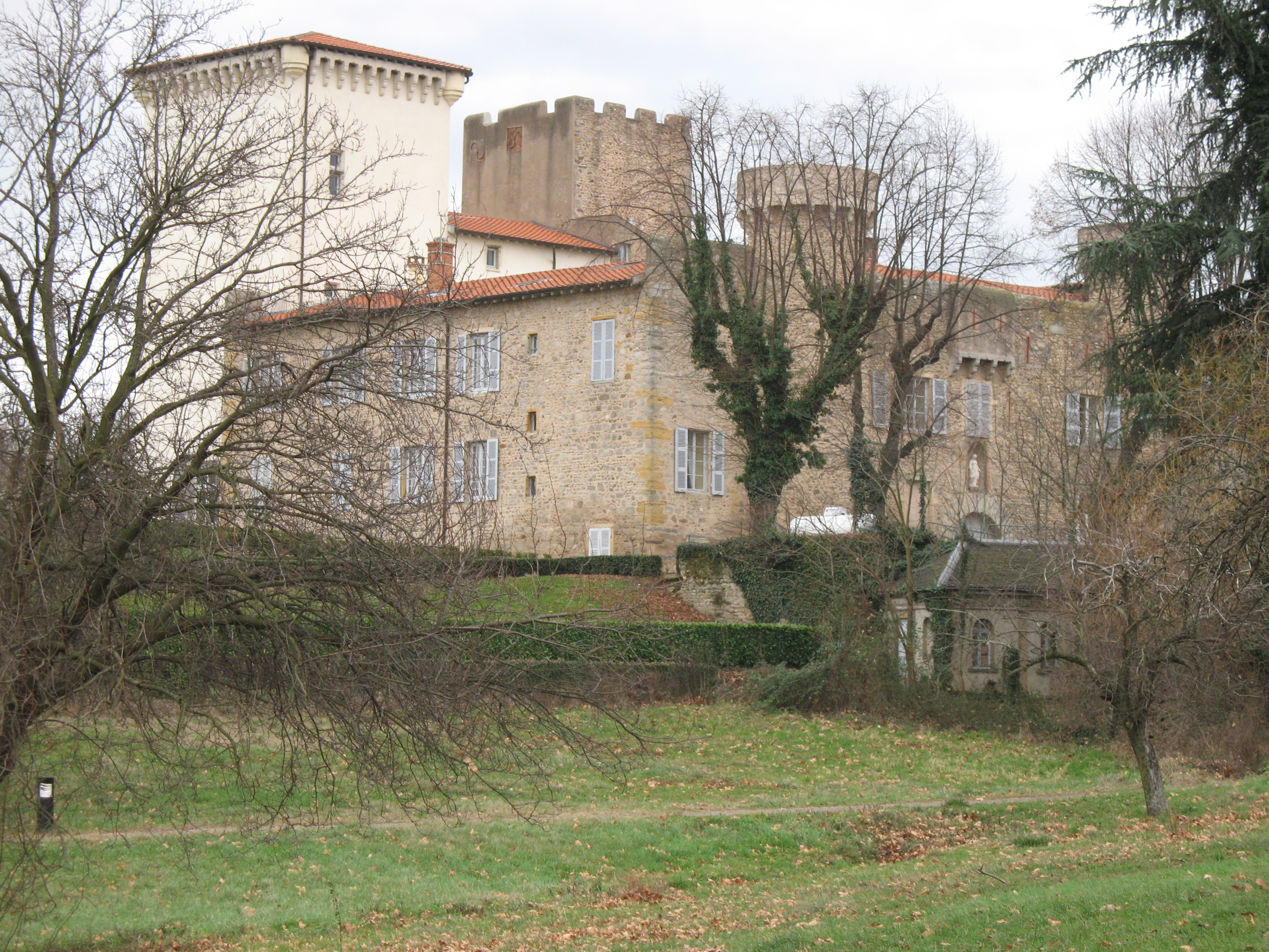 Château de Charly à Charly dans le Rhône.